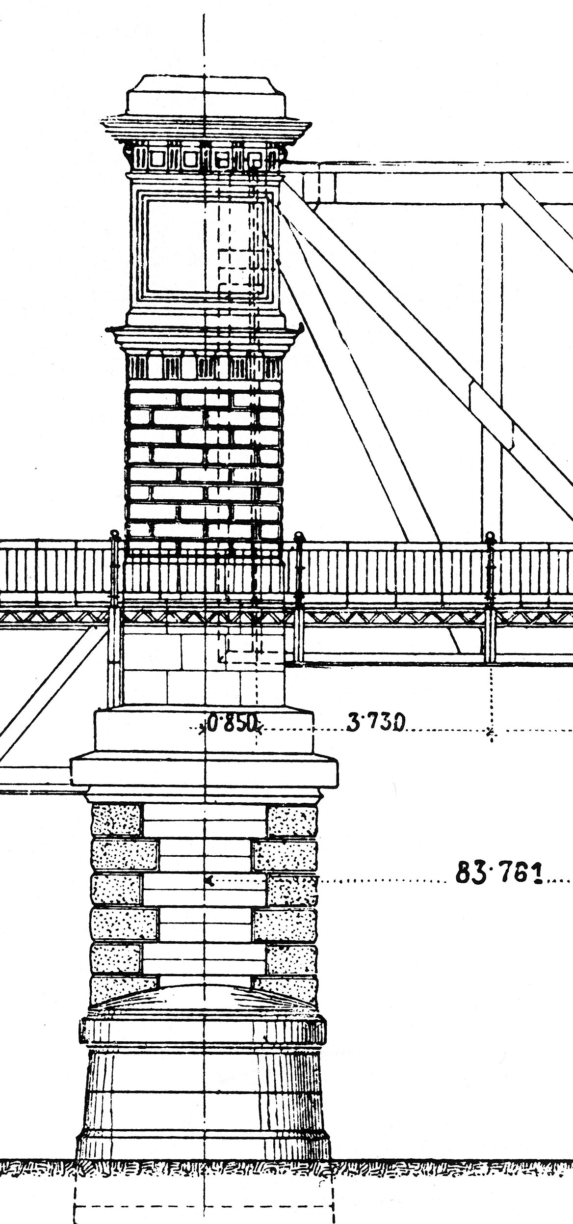 Entwurfszeichnung (Seitenansicht) eines Pfeilers der 1872-1874 erbauten Kaiser-Franz-Joseph-Brücke über die Donau in Wien, zwischen Brigittenau (XX.) und Floridsdorf (XXI.); 1913-1924 ersetzt durch die Floridsdorfer Brücke